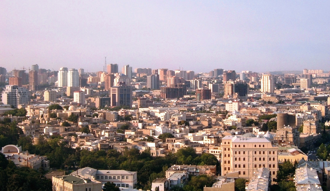 Панорама г.Баку, 2005 г.